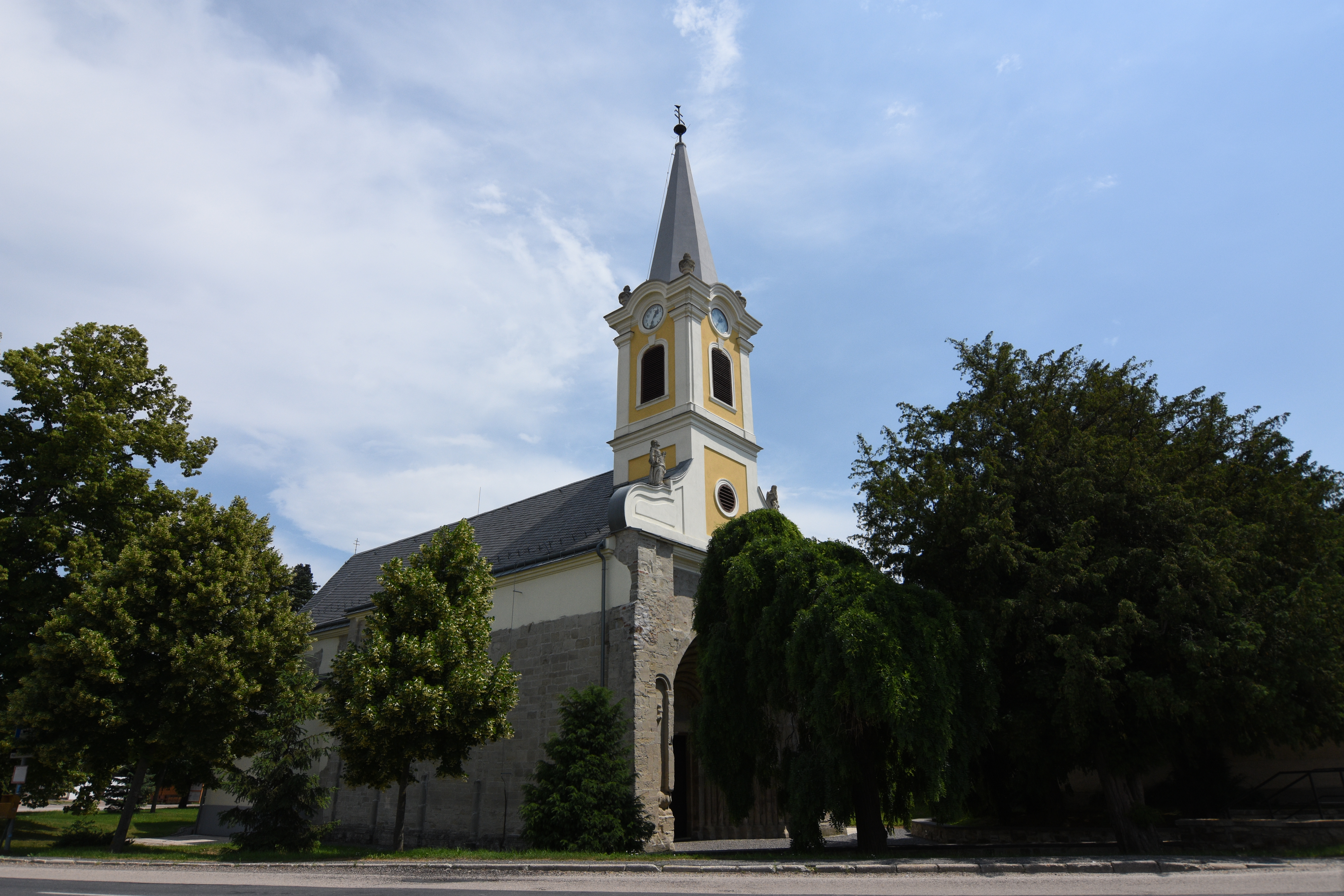 Saints Peter and Paul church in Sopronhorpács